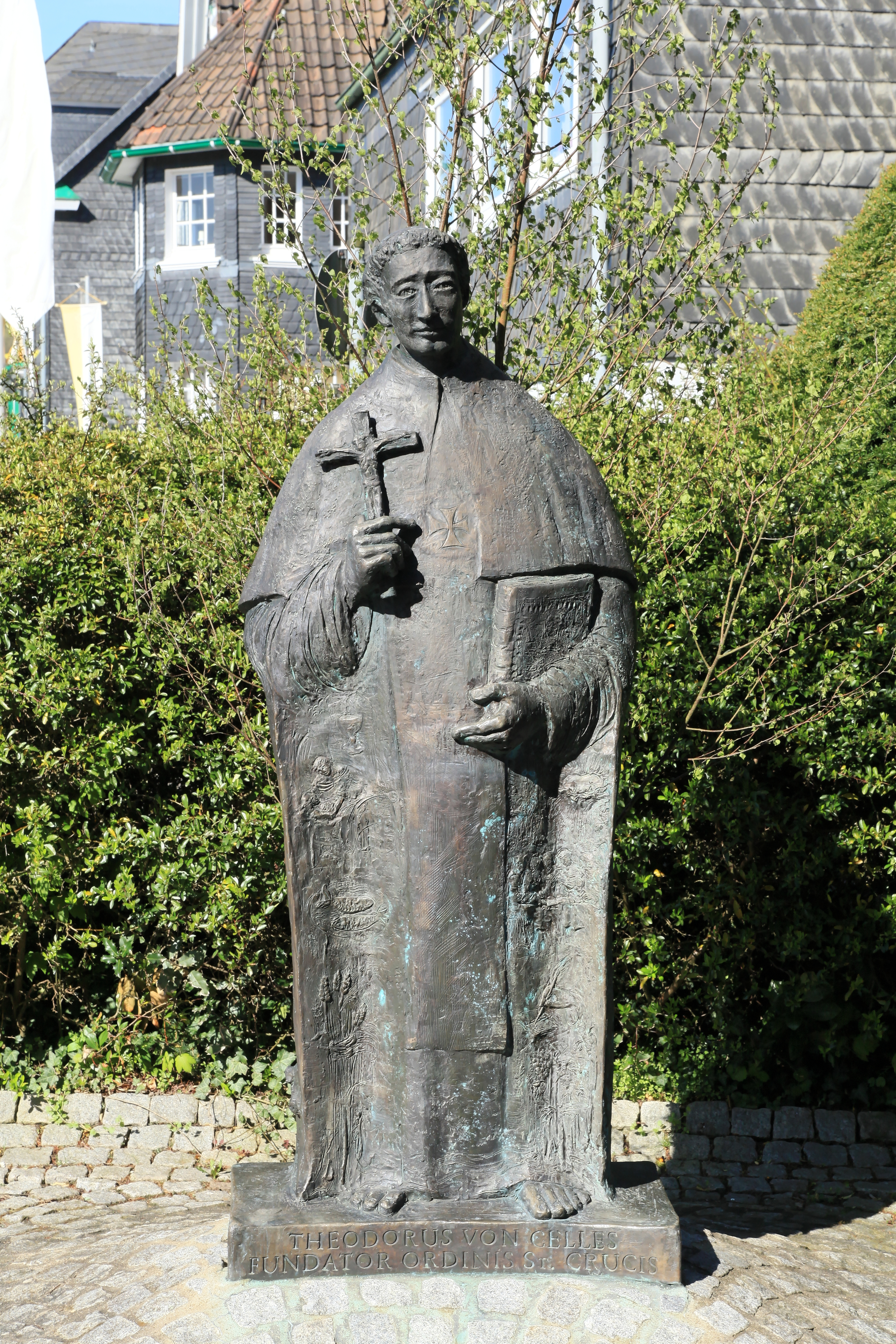 Statue des Theodorus von Celles, Beyenburger Freiheit in Wuppertal